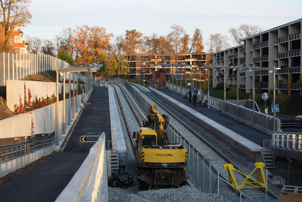 Åsjordet T-banestasjon er delvis en byggeplass for tiden også.